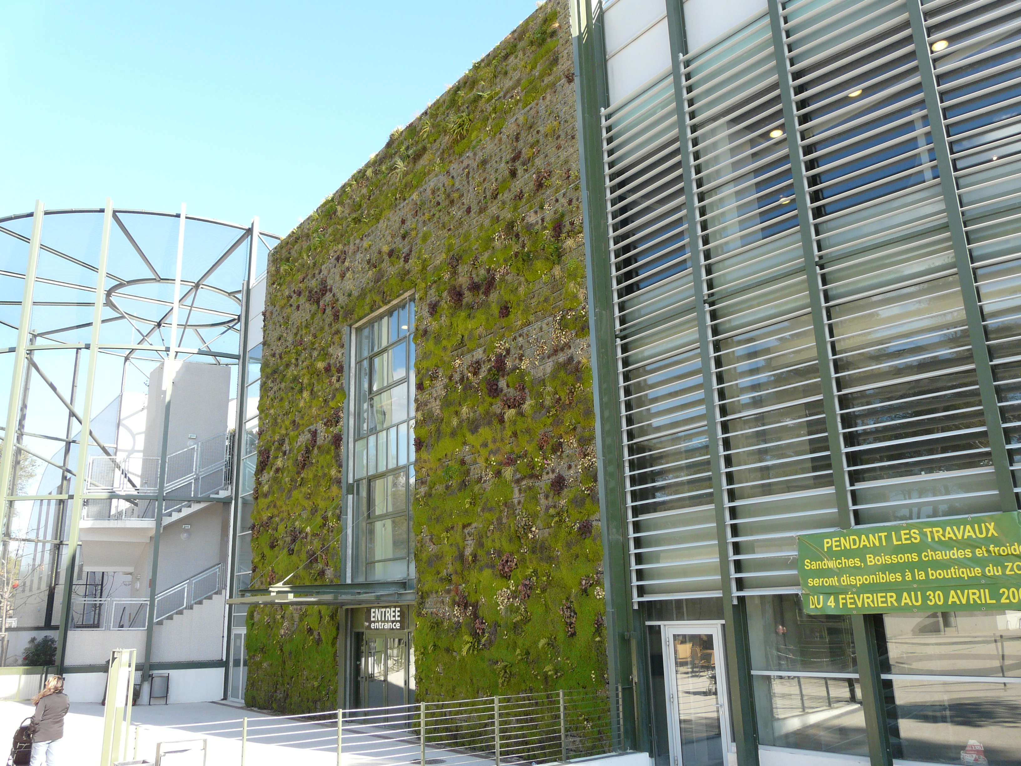 La serre amazonienne, entrance